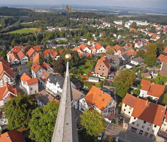 Oerlinghausen Kirchturmspitze mit Flugroboter fotografiert